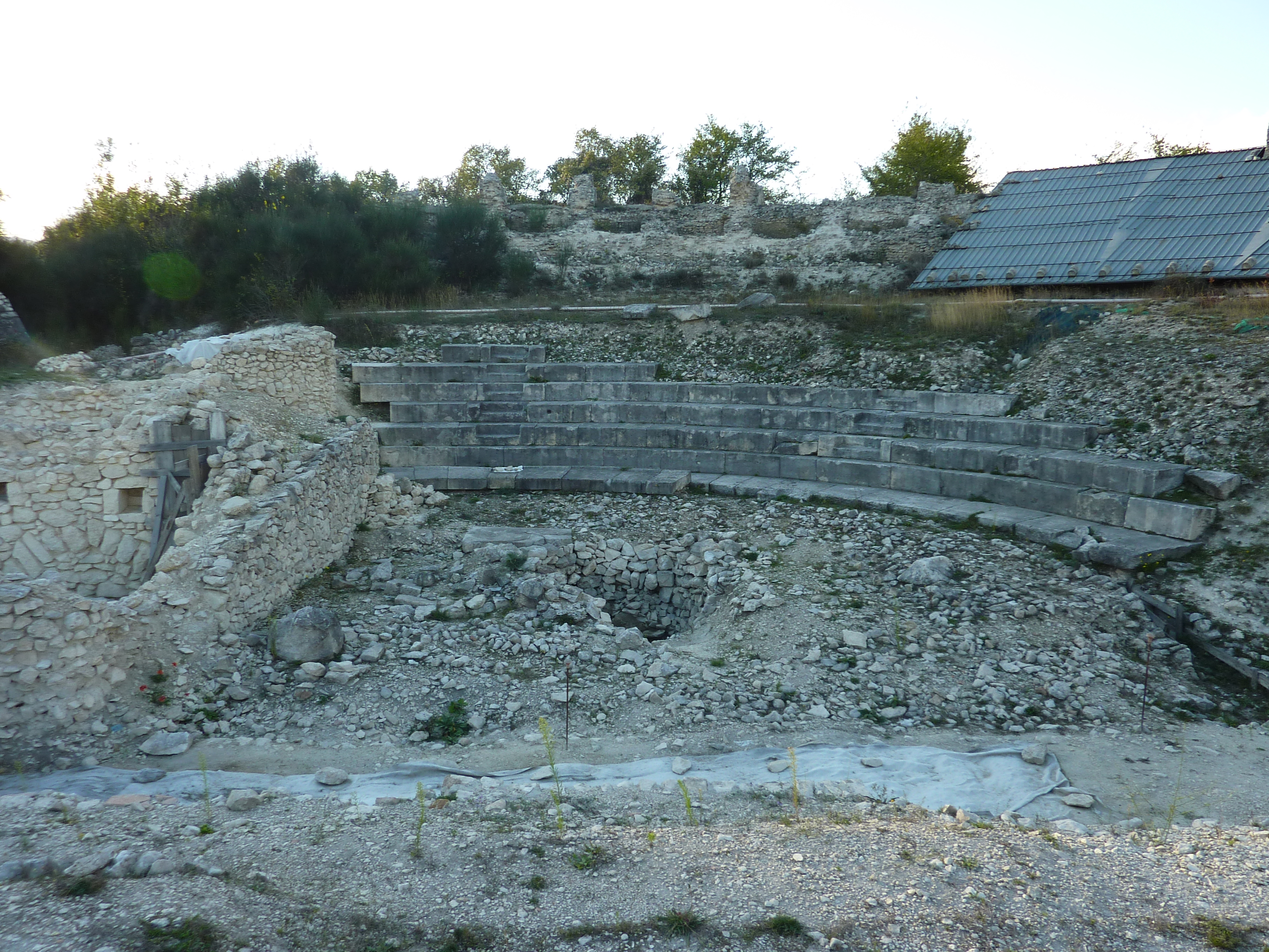 Peltuinum